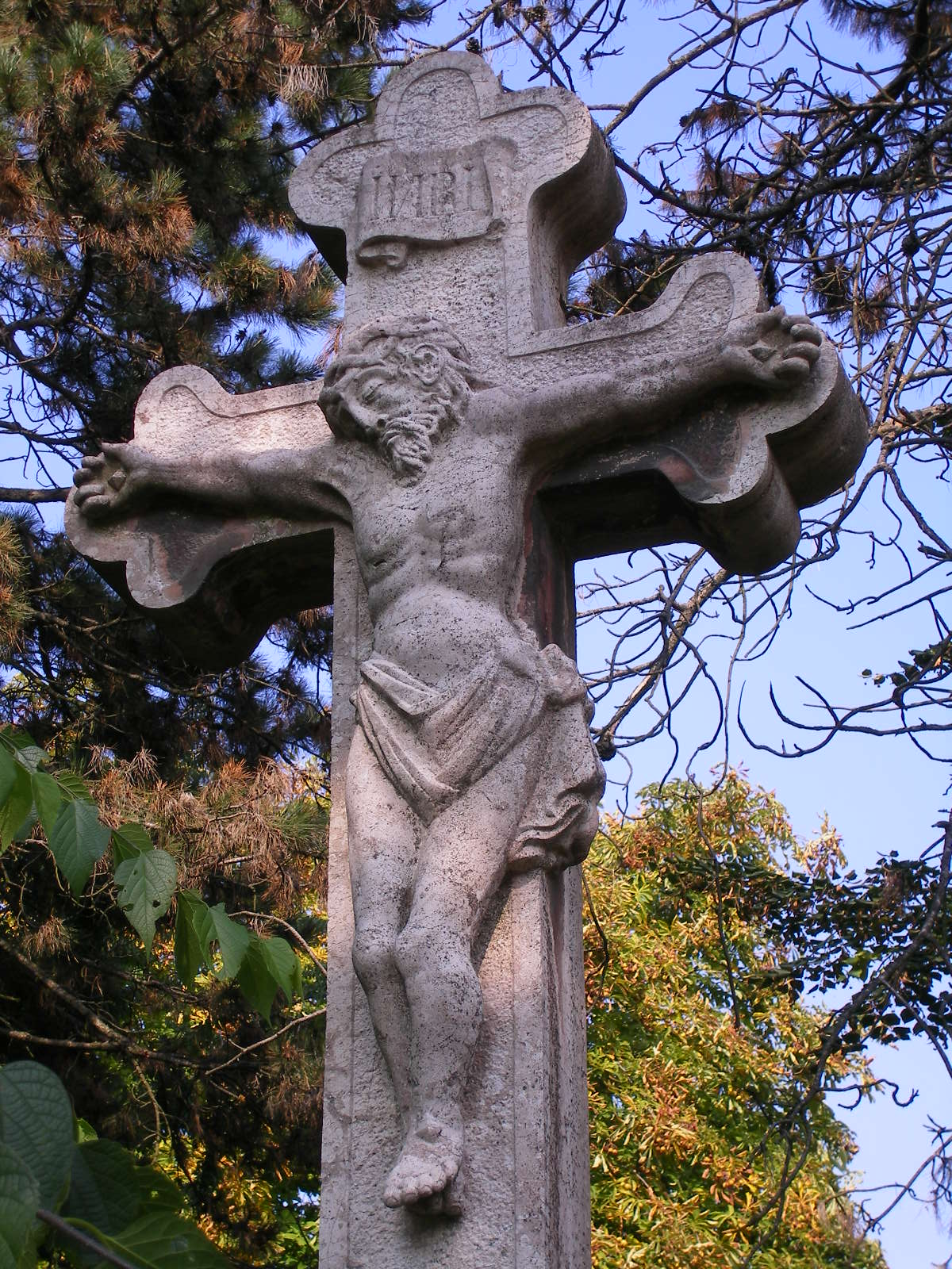 Udvard - kereszt a községközpontban